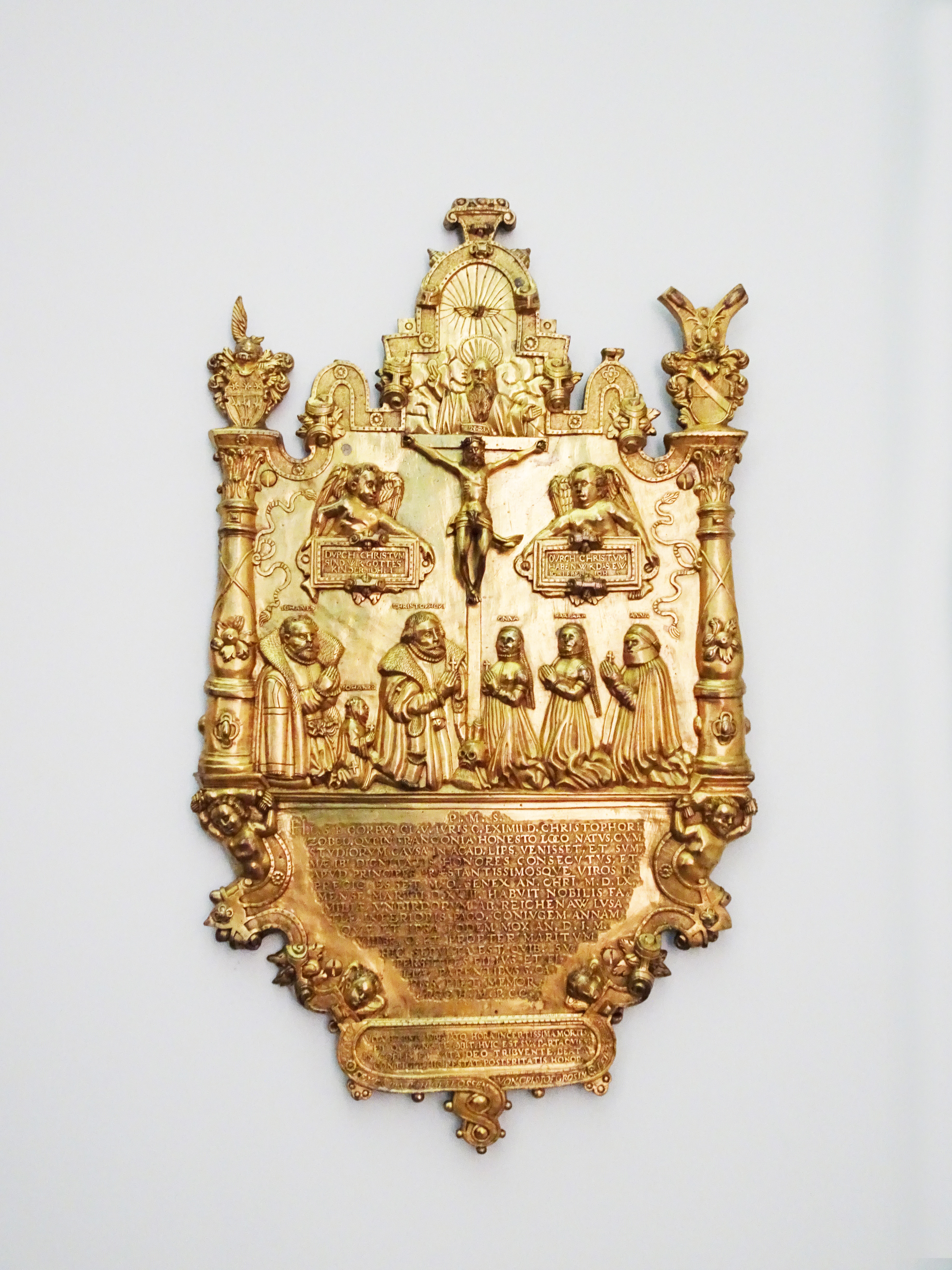 Epitaph für Christoph Zobel in der Leipziger Universitätskirche